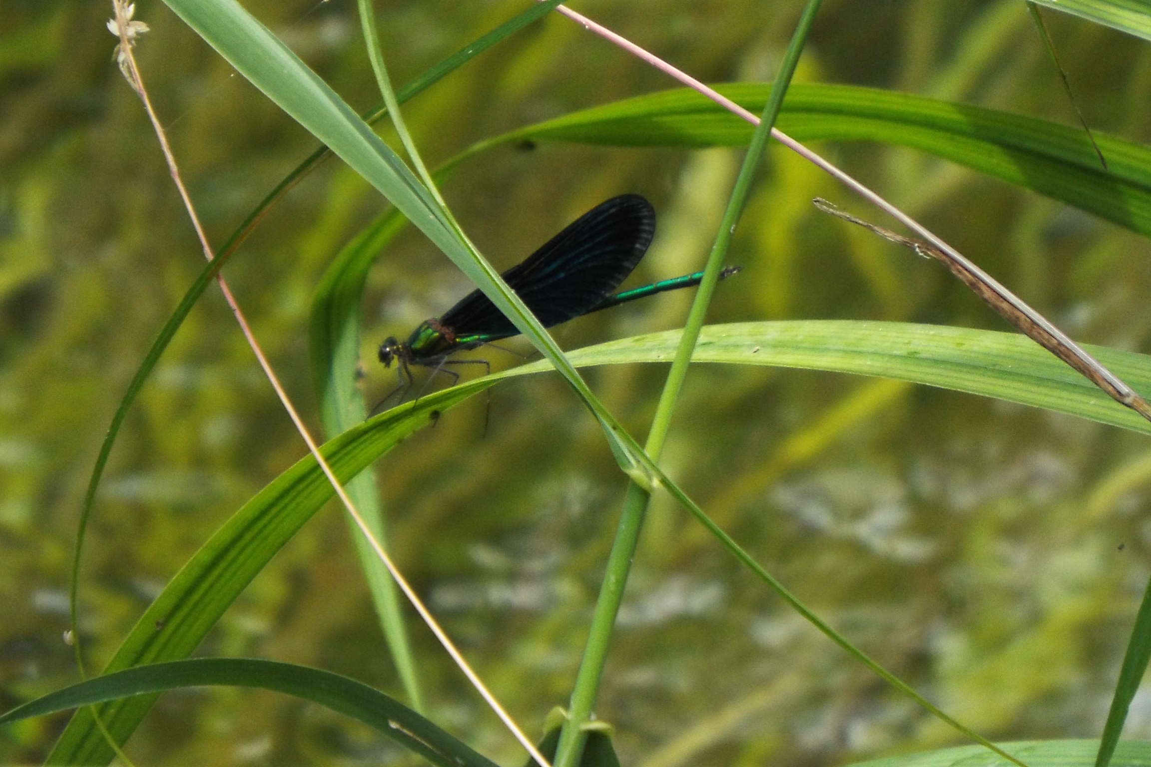 2016-07-03 Daio Wasabi Farm 大王わさび農園 蓼川,アオハダトンボ雄 Calopteryx japonica male